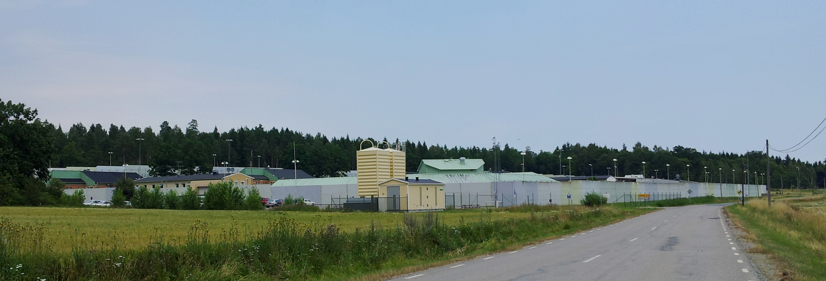 Kriminalvårdsanstalten i Mariefred, Bondängen, juli 2012